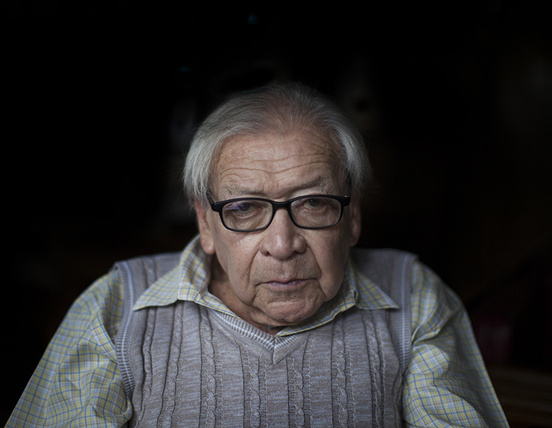 Carlos Guzmán-Böckler. Fotografía por Sandra Sebastián